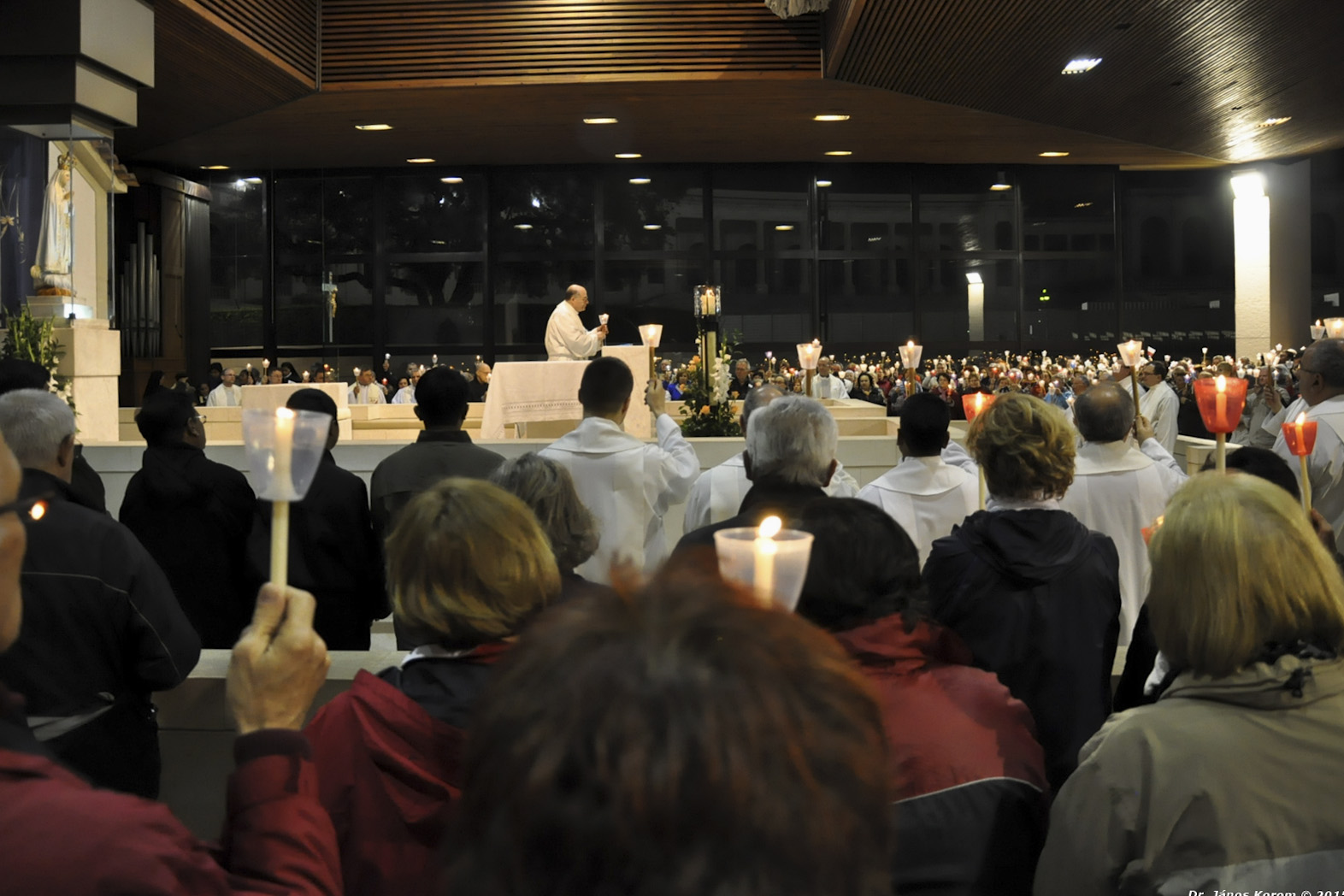 Internationales Rosenkranzgebet und Lichterprozession